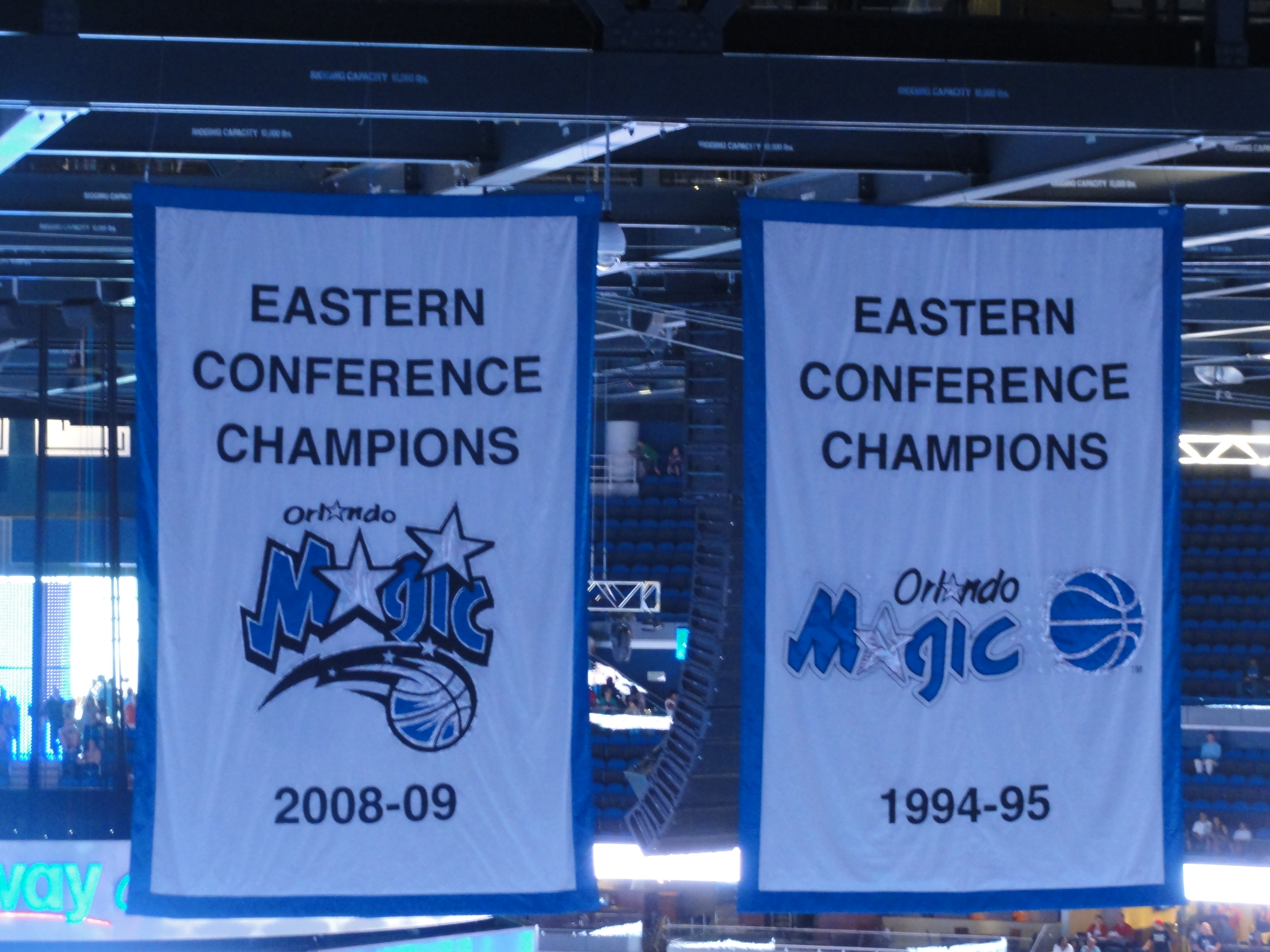 2010/10/02 at Amway CENTER.